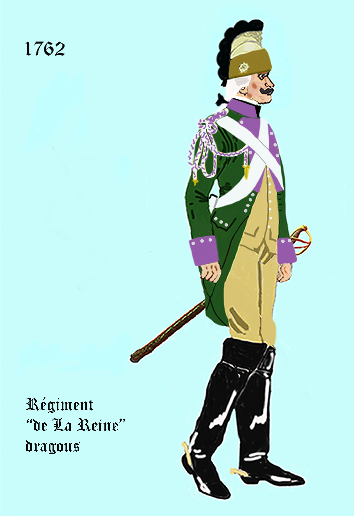 l'uniforme du régiment „de La Reine“ de 1762